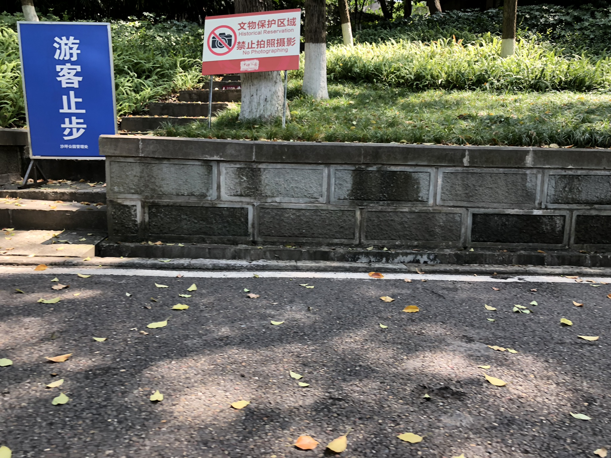 中文（中国大陆）: 通往重庆市沙坪公园文革墓群的台阶上游客止步的标语